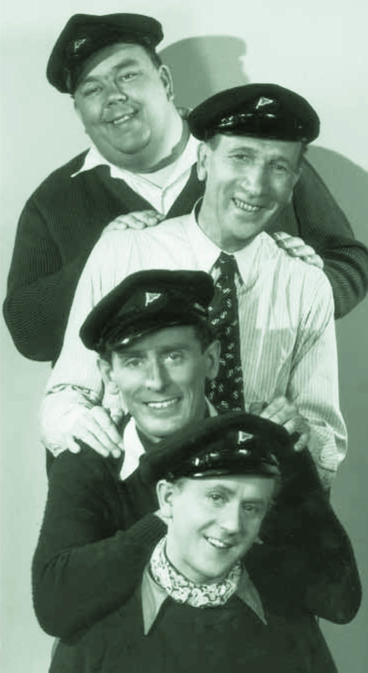 Benkt-Åke Benktsson, Ludde Gentzel, Lasse Dahlquist och Åke Söderblom i samband med filmen "Vi masthuggspojkar" (1940).